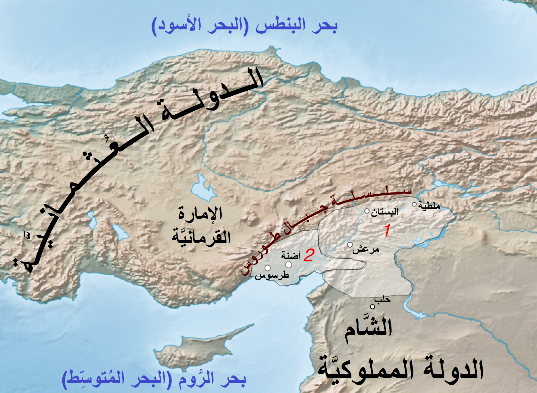 موقع إمارتيّ رمضان (2) وذي القدريَّة (1) بين الدولتين العُثمانيَّة والمملوكيَّة.